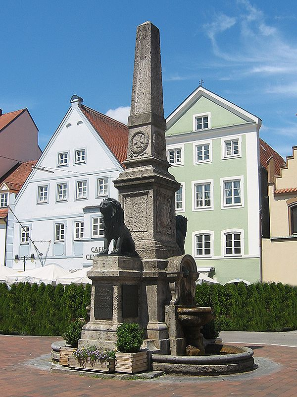 Freising, Kriegerdenkmal mit Obelisk und Löwen, 1905